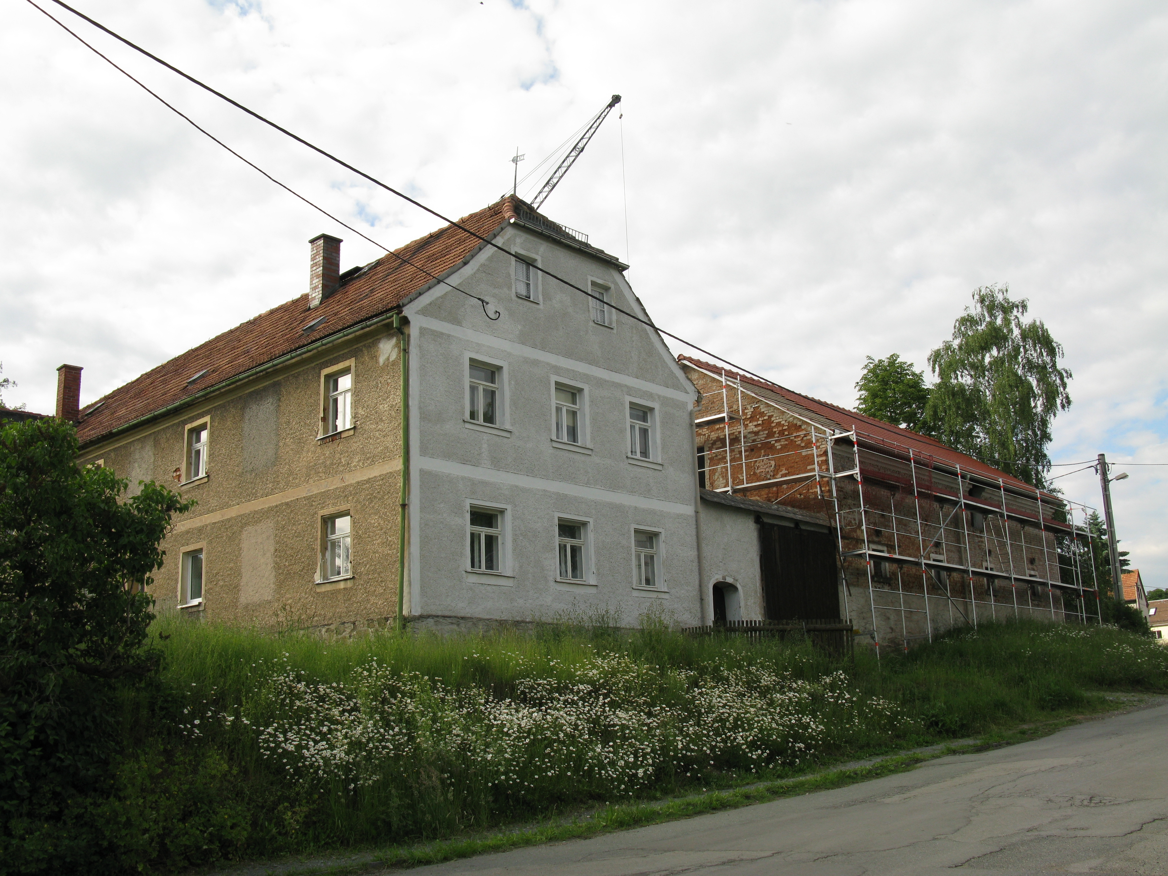 Plauen- =Unterlosa, denkmalgeschütztes Gehöft in der Mittelstraße (Mittelstraße 16).